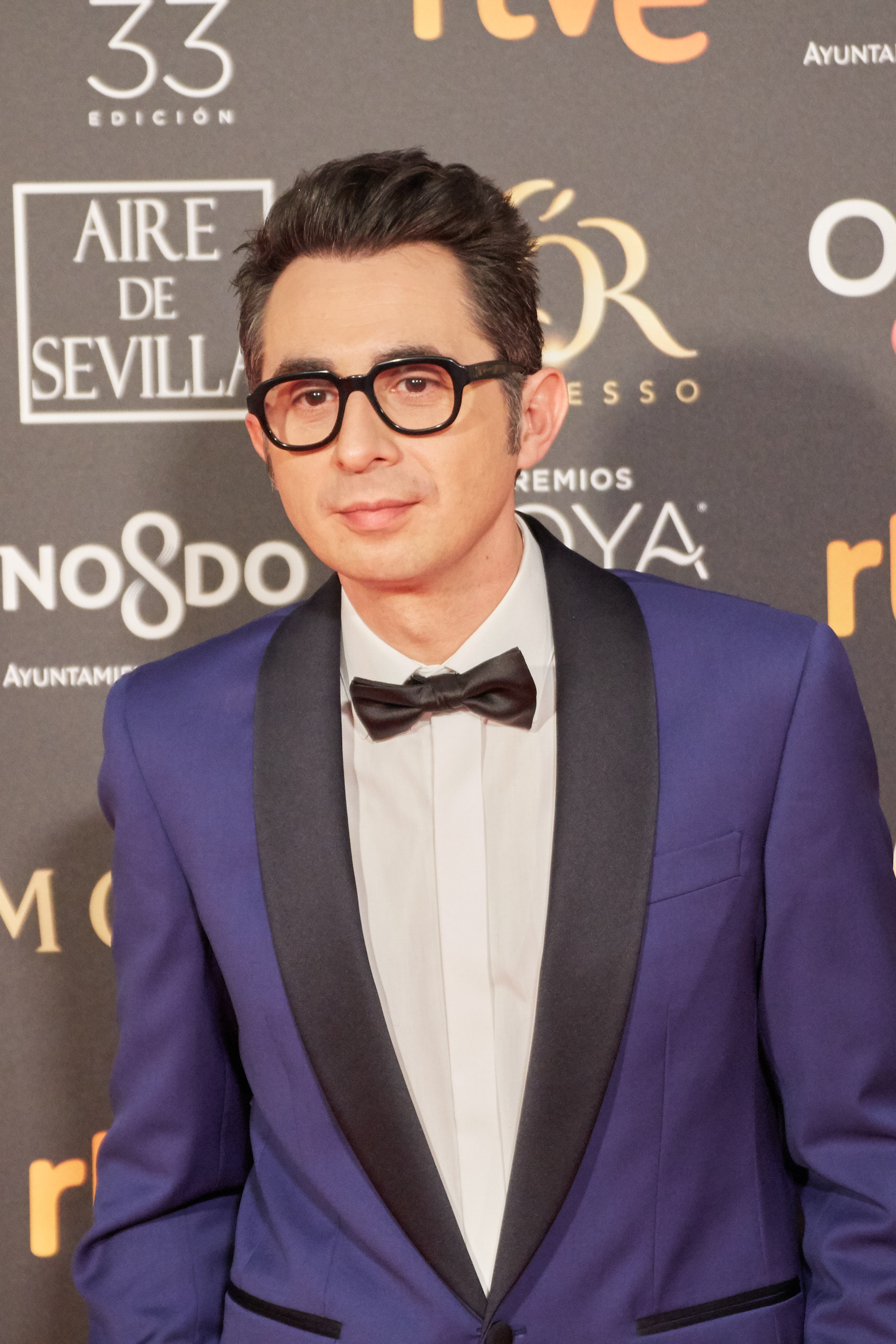 Berto Romero en la alfombra roja de los Premios Goya celebrados en Sevilla en Febrero 2019